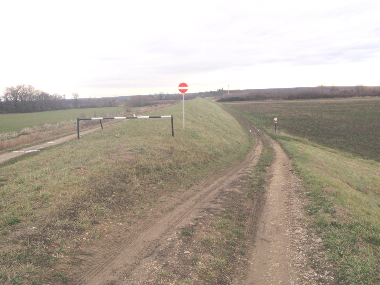 Blick von Bük-Bő-Gór-See (Hochwasser und Erlebniss See)